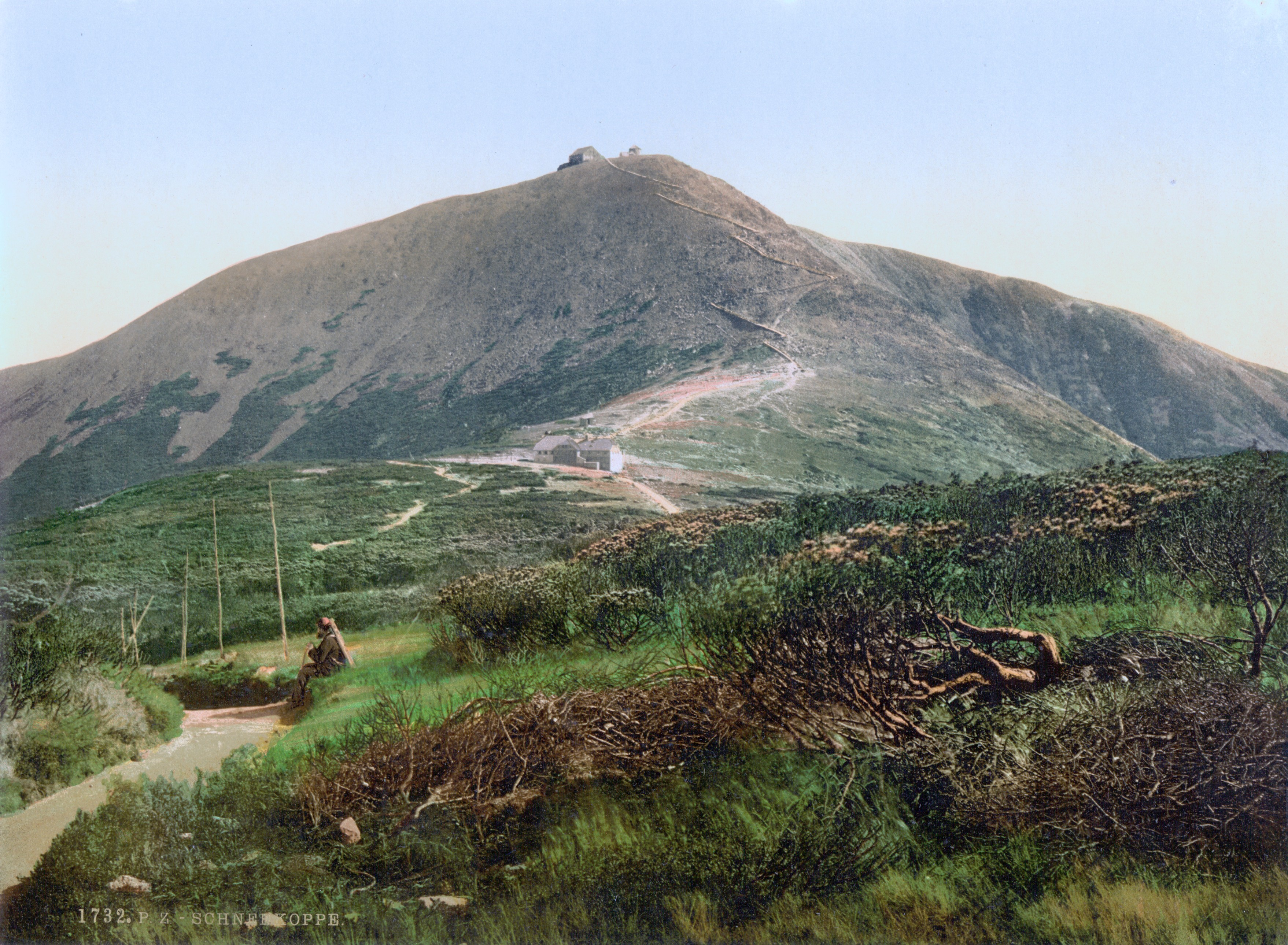 Sněžka